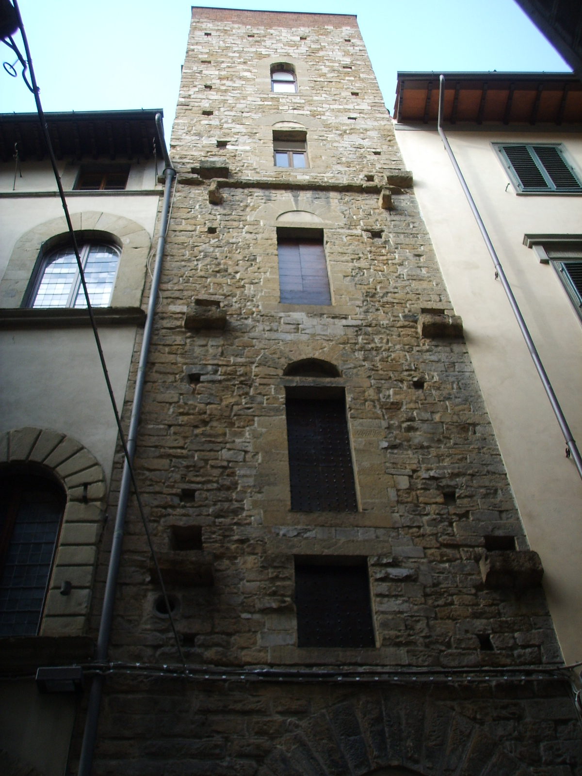 Torre dei buondelmonti